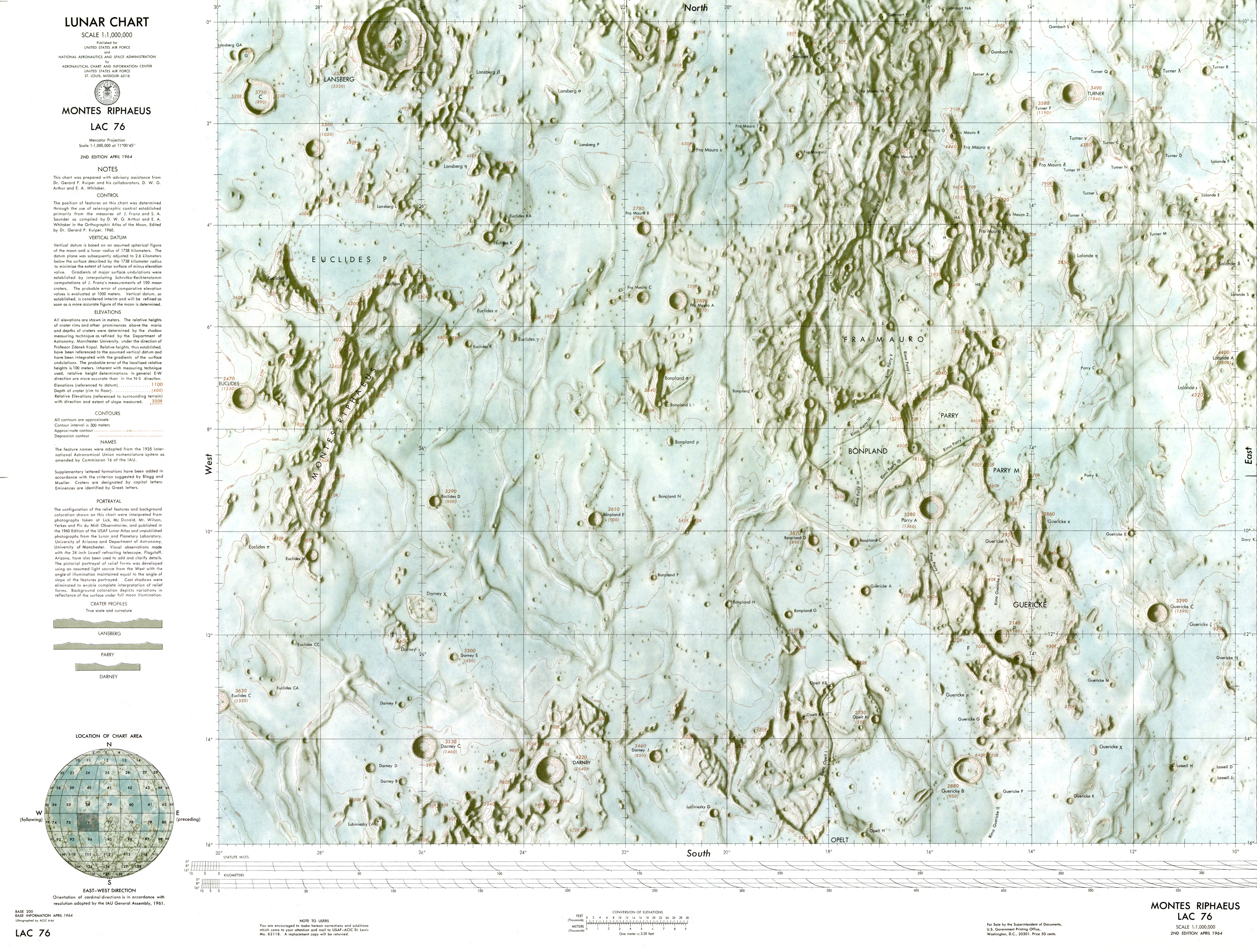 1:000 000 scale lunar chart - Montes Riphaeus (LAC 76)